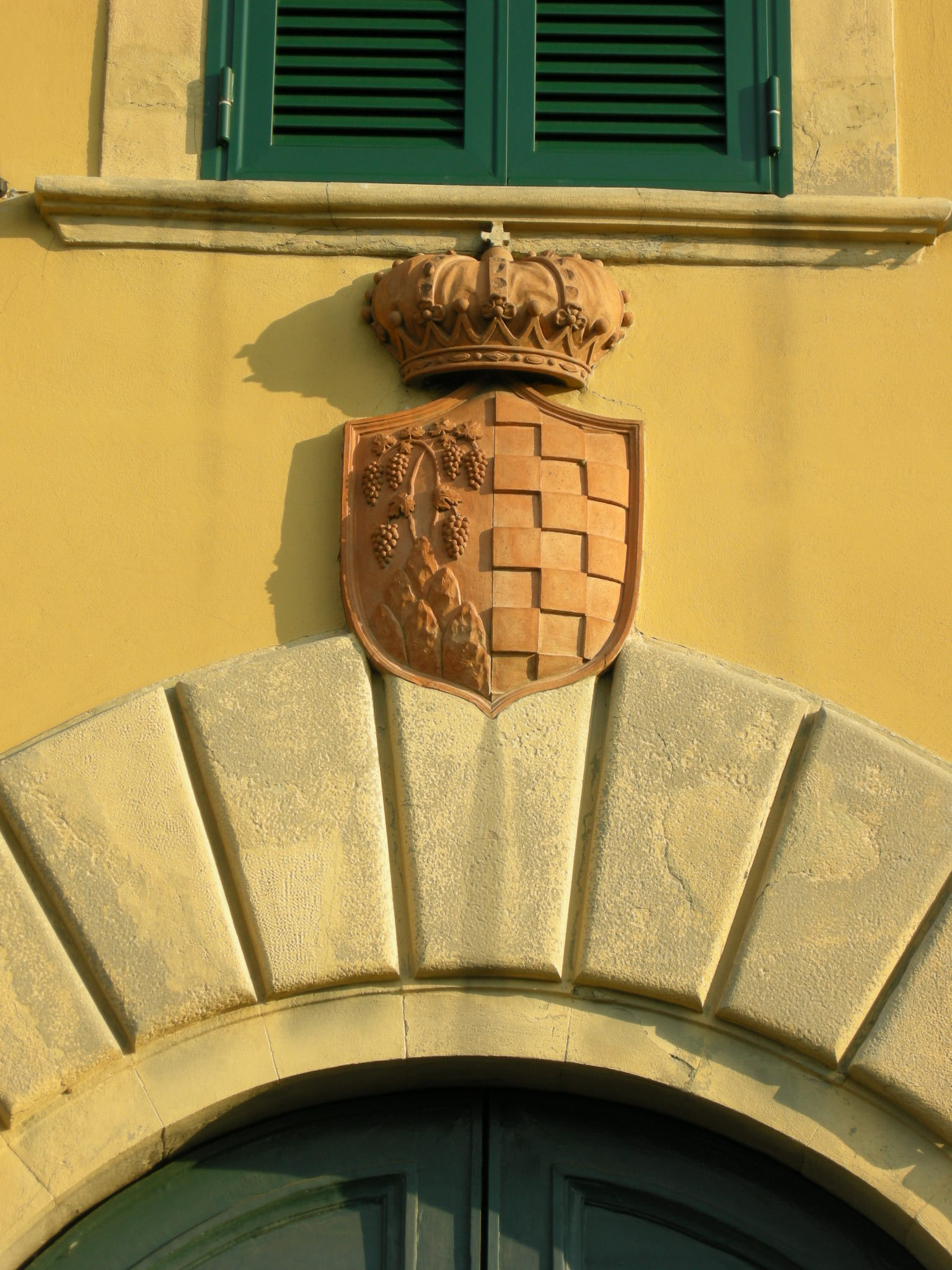 Villa ruspoli da s.marta